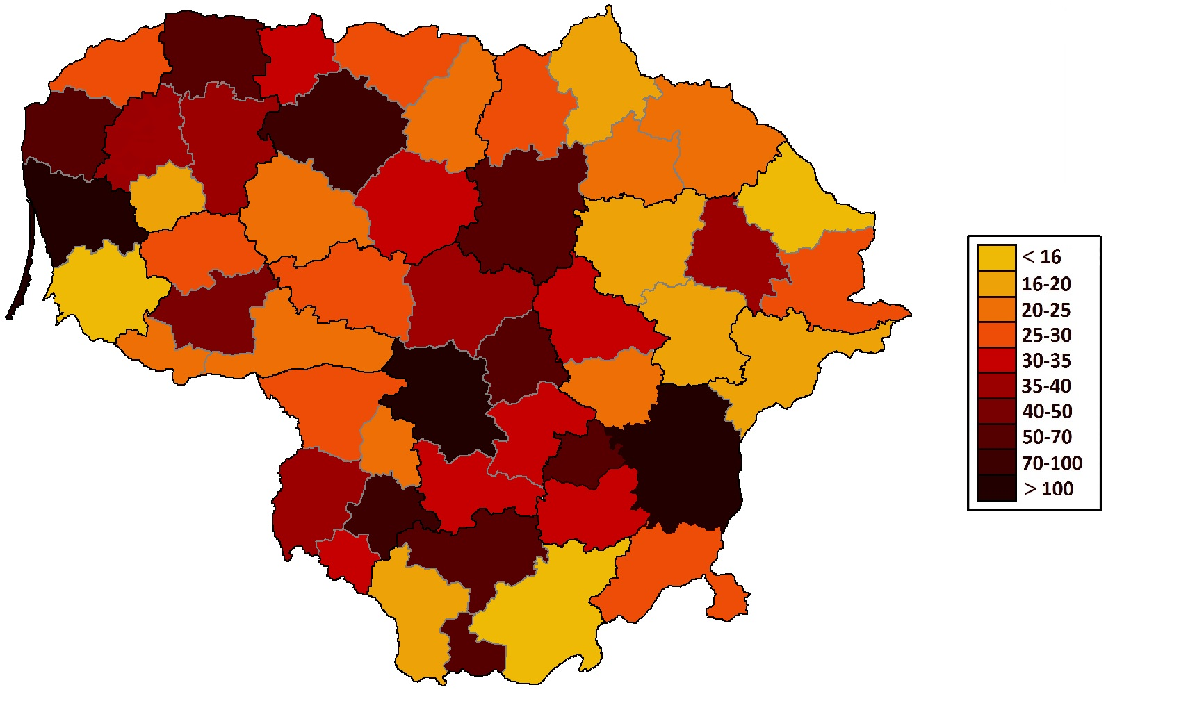 Плотность населения Литвы. Города, находящиеся между районов умышлена присоединялись к одному из них на усмотрение автора.